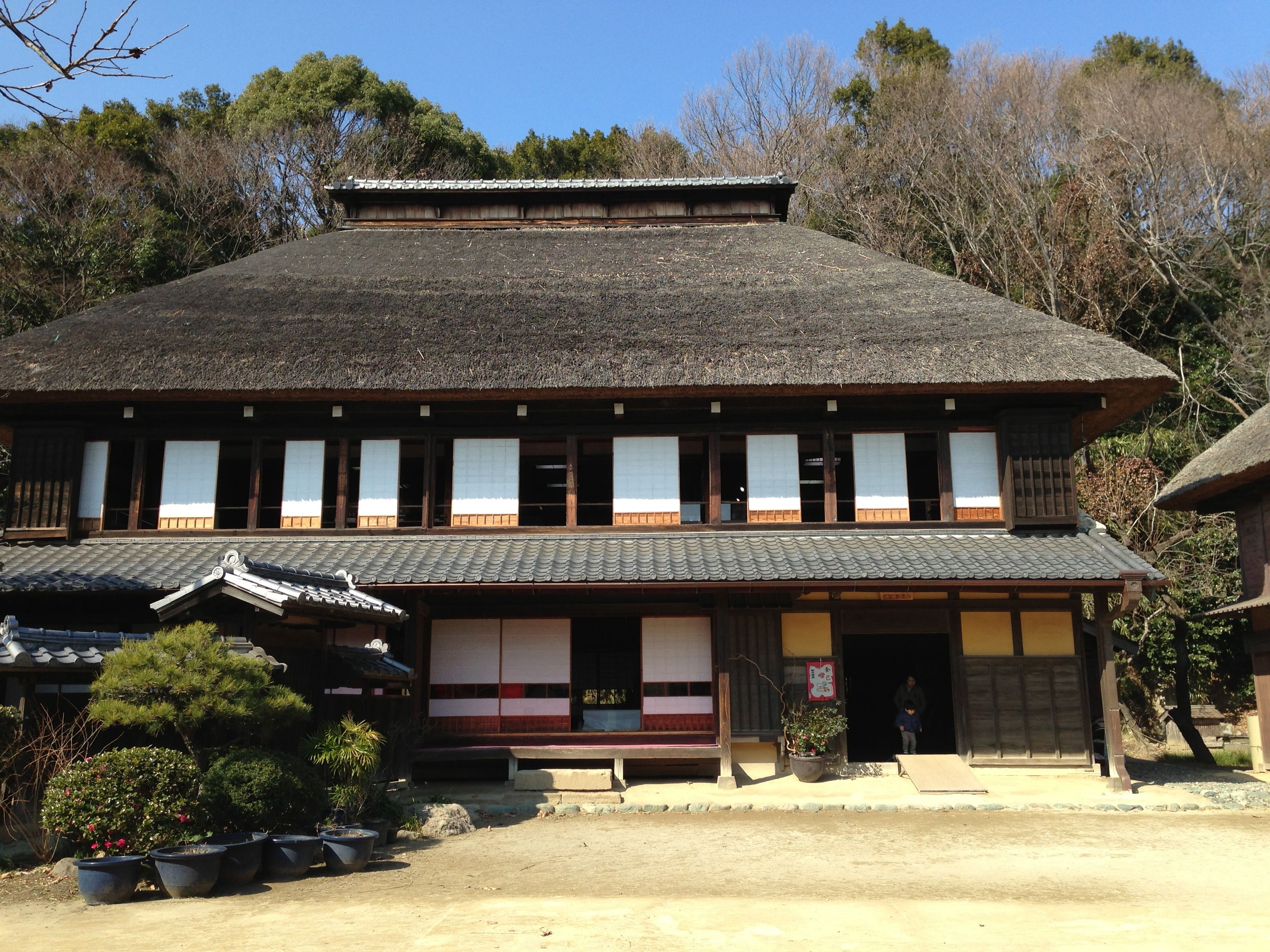 鶴見区獅子ヶ谷町